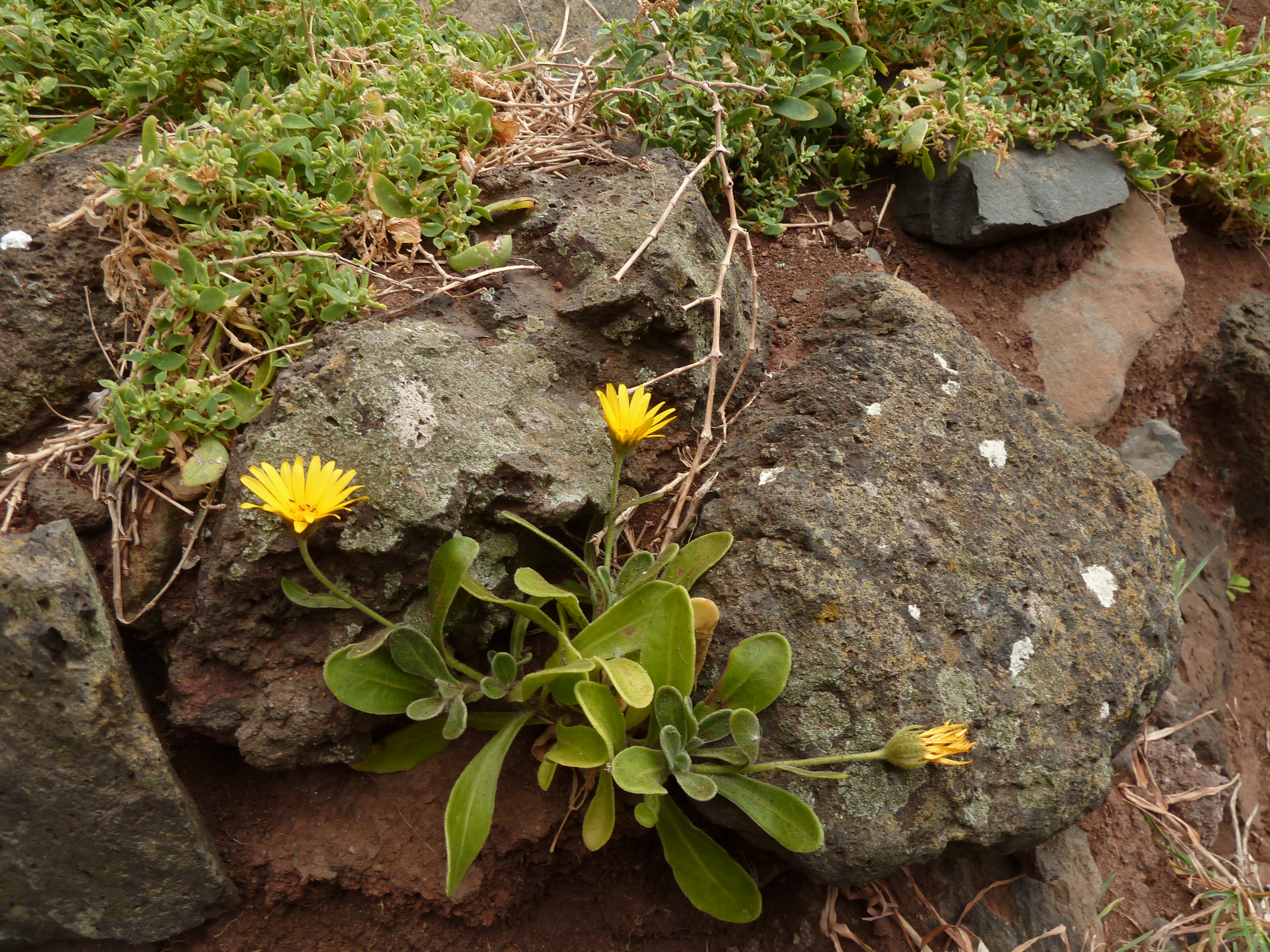 Calendula maderensis, Ile de Madère